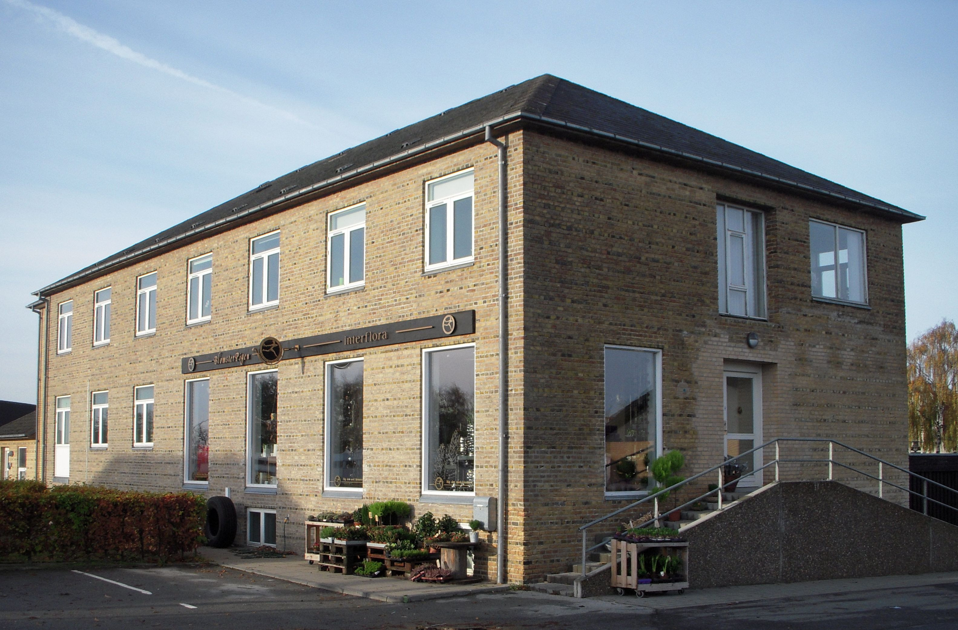 Den tidligere Horsens-Hammer Kommunes administrationsbygning i Vodskov. November 2013